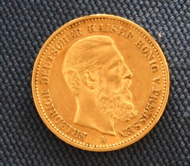 20 Mark von 1888 (ca.) mit Konterfei Friedrich III.